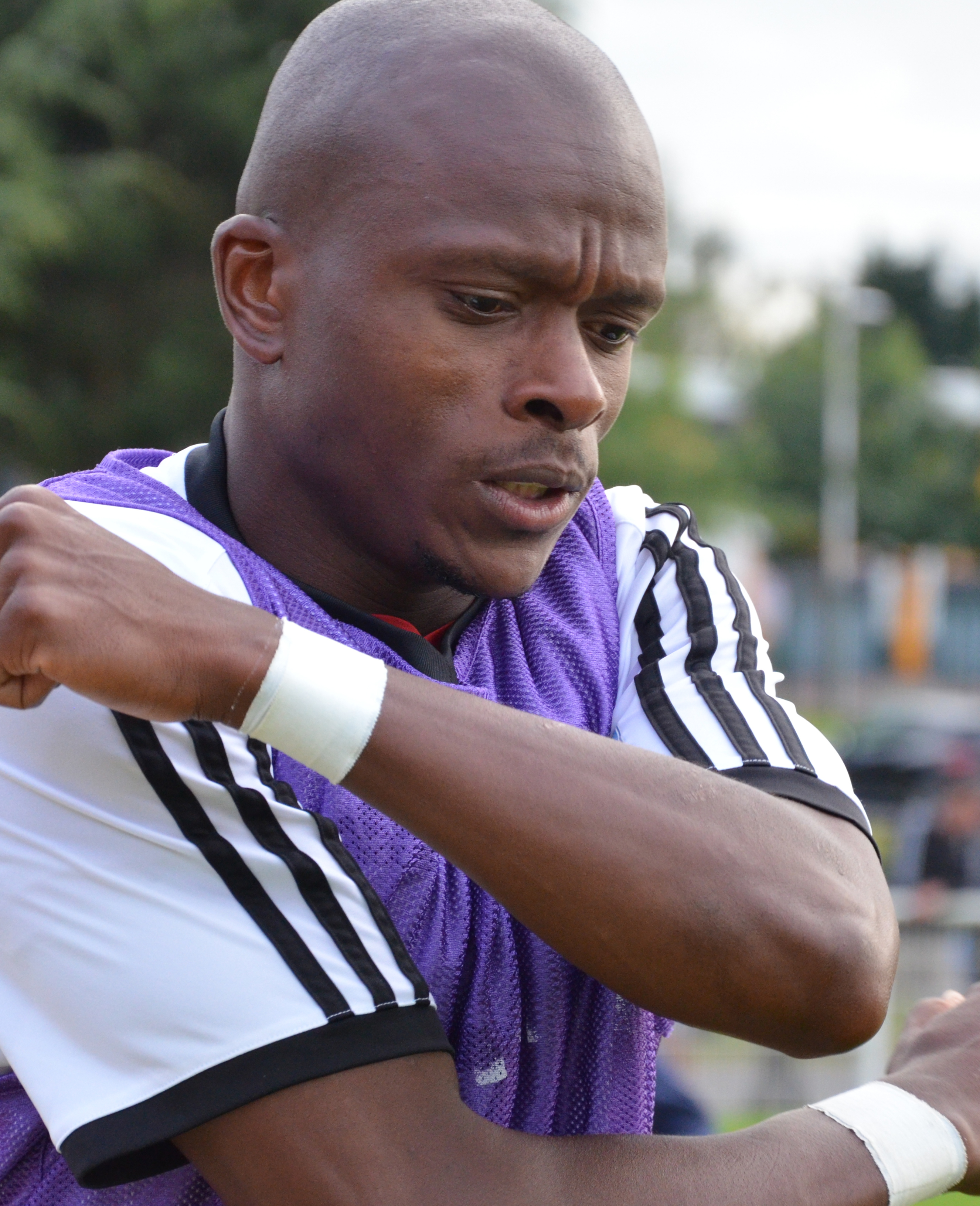 Photographie prise lors du match opposant le SM Caen à l'UNFP en match amical au stade Louis-Villemer de Saint-Lô le 30 juillet 2016. Ici, Christian Kinkela.